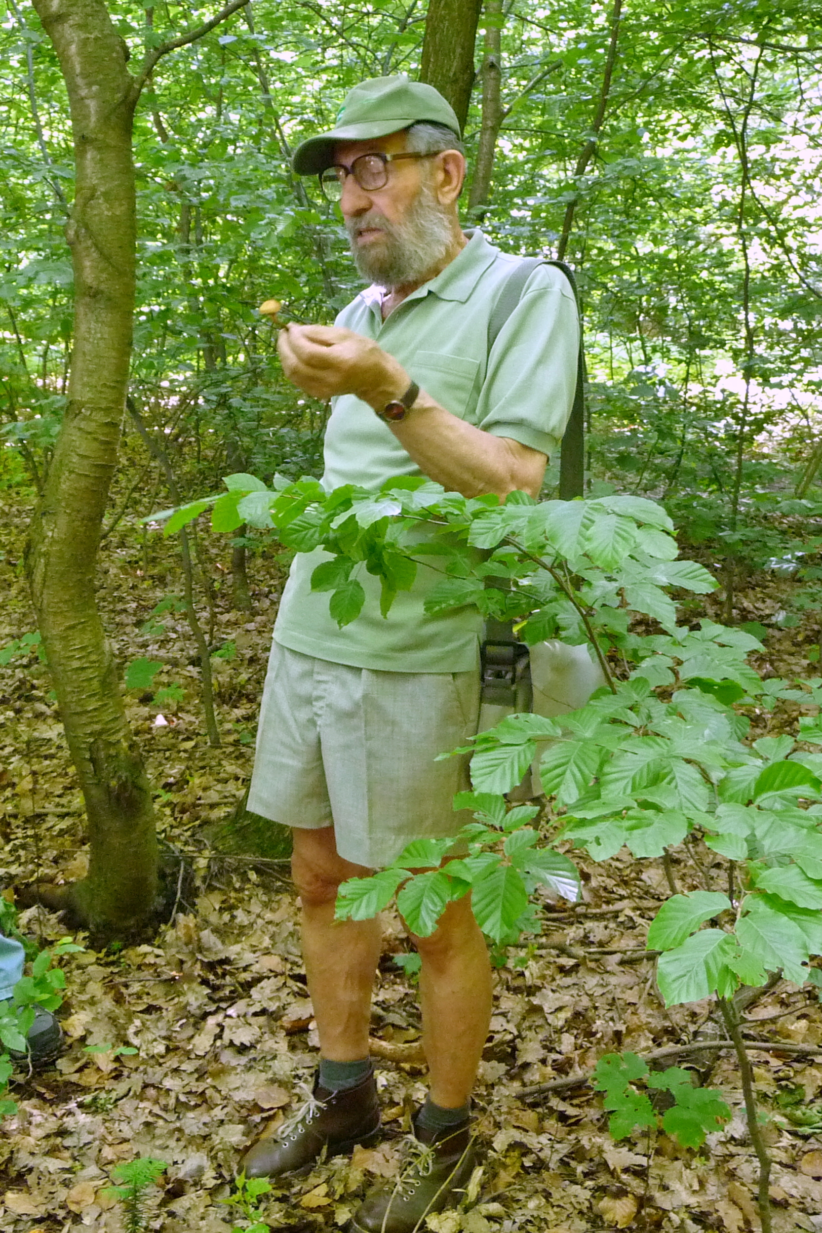 RNDr. František Kotlaba, CSc., význačný český mykolog, vede mykologickou exkursi v oboře Hvězda v Praze 22. 5. 2014.